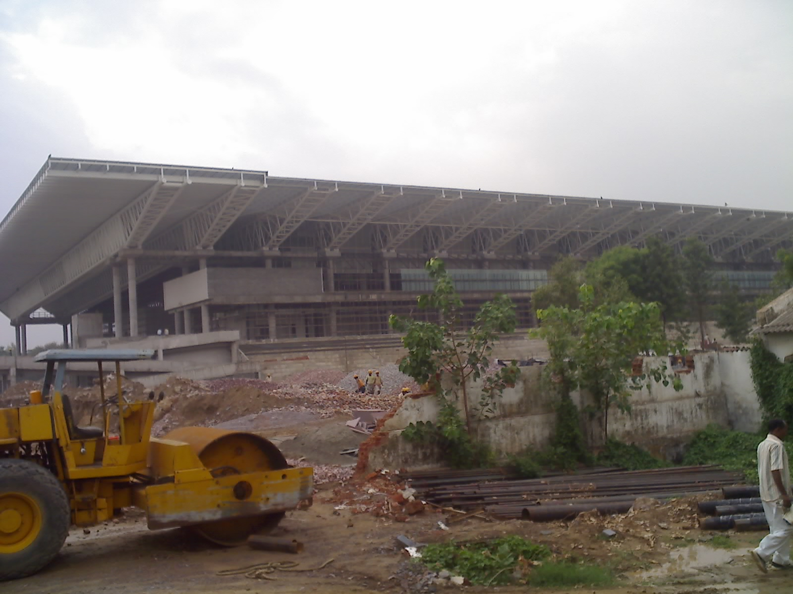 त्यागराज स्टेडियम, दिल्ली